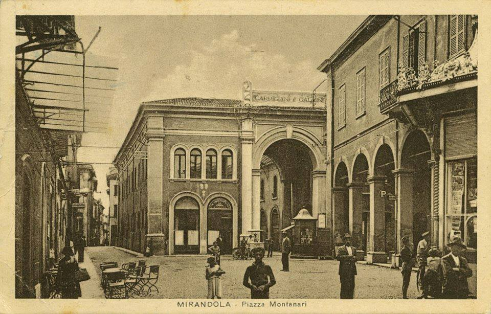 Piazza Montanara (attuale piazza Giuseppe Mazzini) a Mirandola negli anni 1930-1940